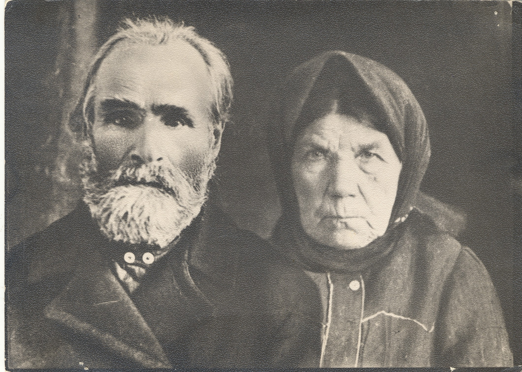 Беларуская (тарашкевіца): Іван Кузьміч і Ахрасіньня Міхайлаўна Гарэцкія. Бацькі Максіма й Гаўрылы Гарэцкіх.